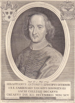 Cardinale Sebastiano Antonio Tanara (1650-1724)